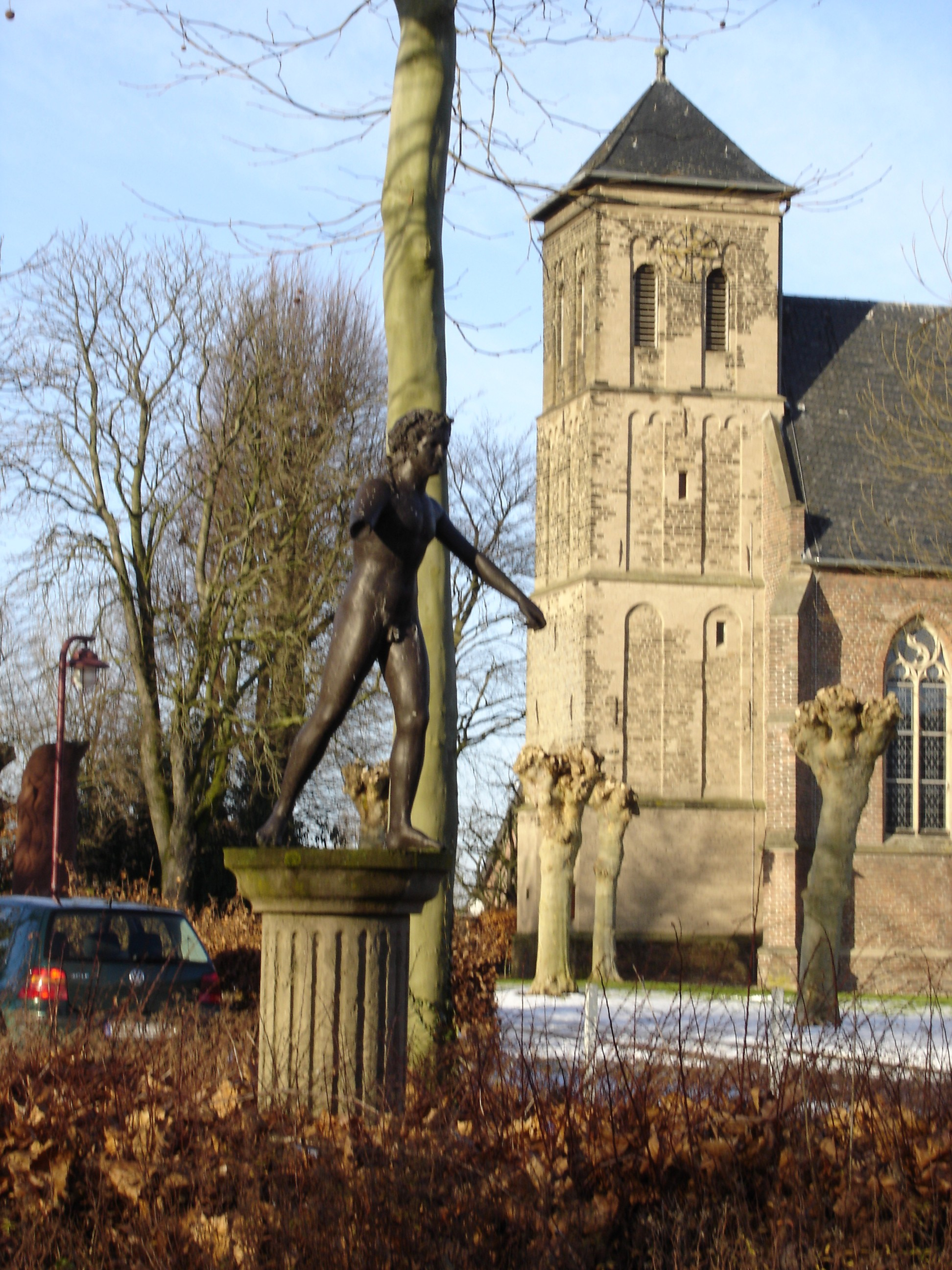 Kirche St. Pantaleon und "Lüttinger Knabe" in Lüttingen selbst fotografiert von Benutzer:Xantener am 29. Dez 2004 Lizenz: GFDL